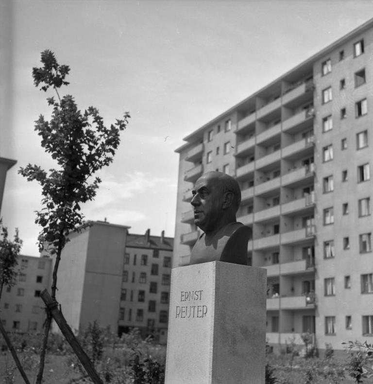 Stadtaufnahmen Berlin Stadtaufnahmen Berlin